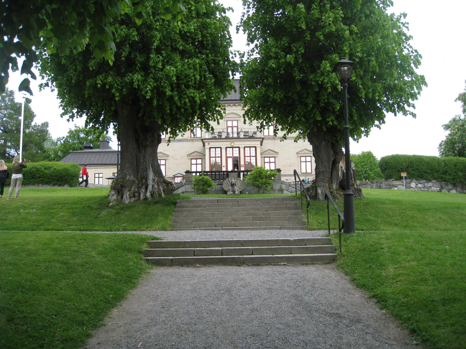 Görvälns slottspark i Järfälla kommun.